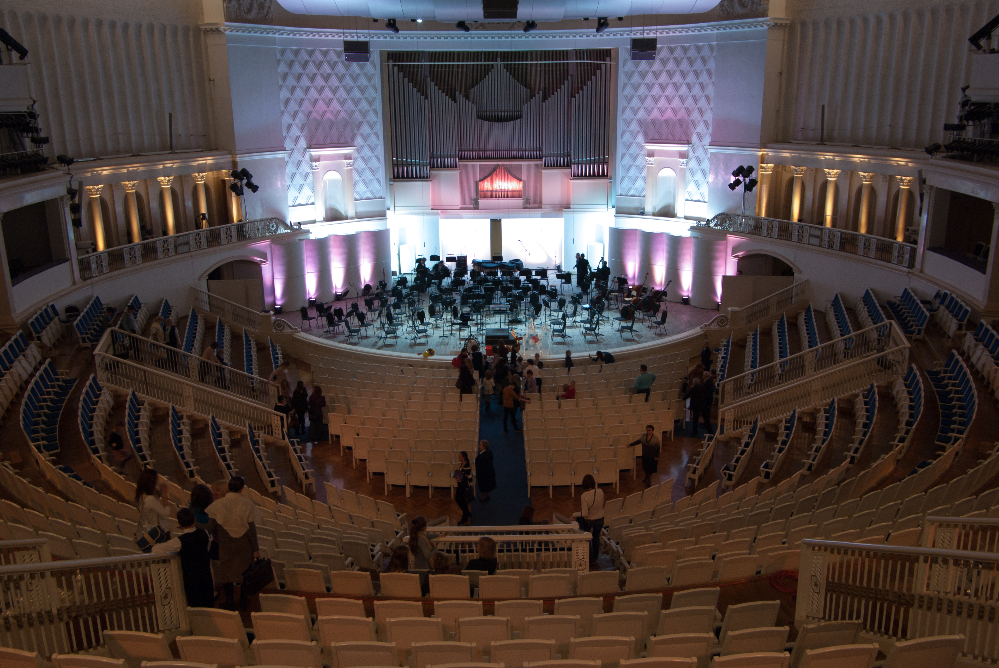 Сцена Концертного зала имени П.И. Чайковского. 19 января 2013 года.